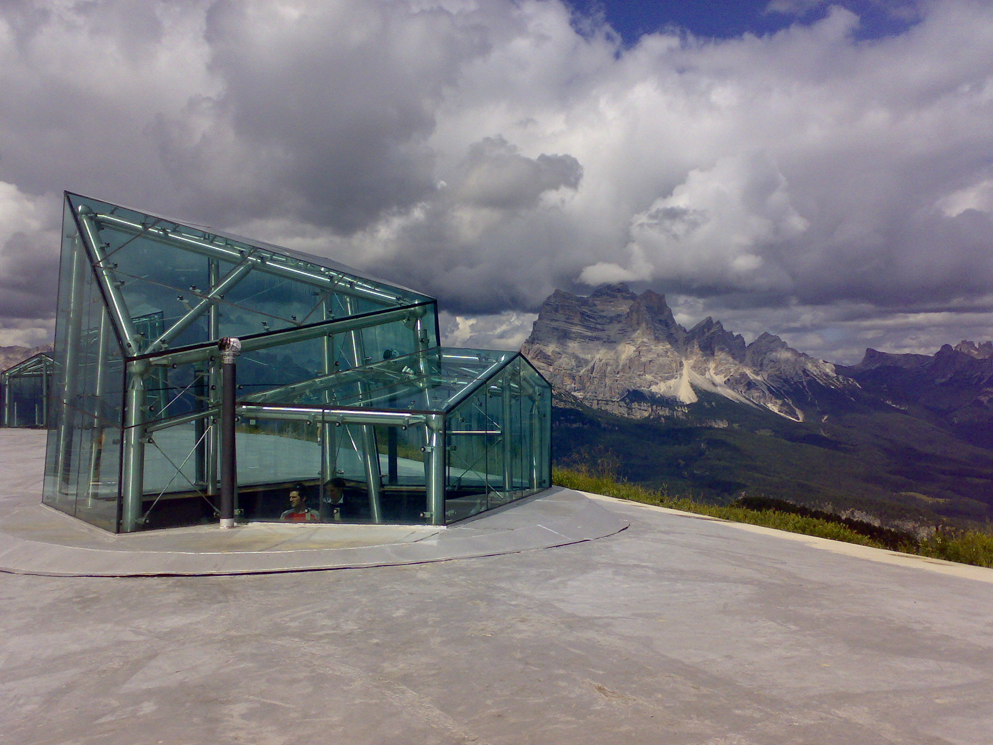 Museo nelle Nuvole